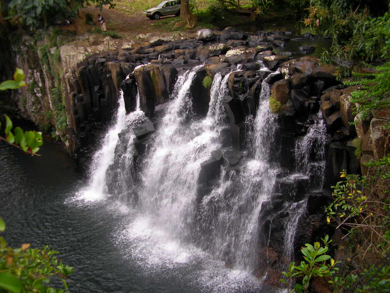 Rochester falls - waterfall on Mauritius